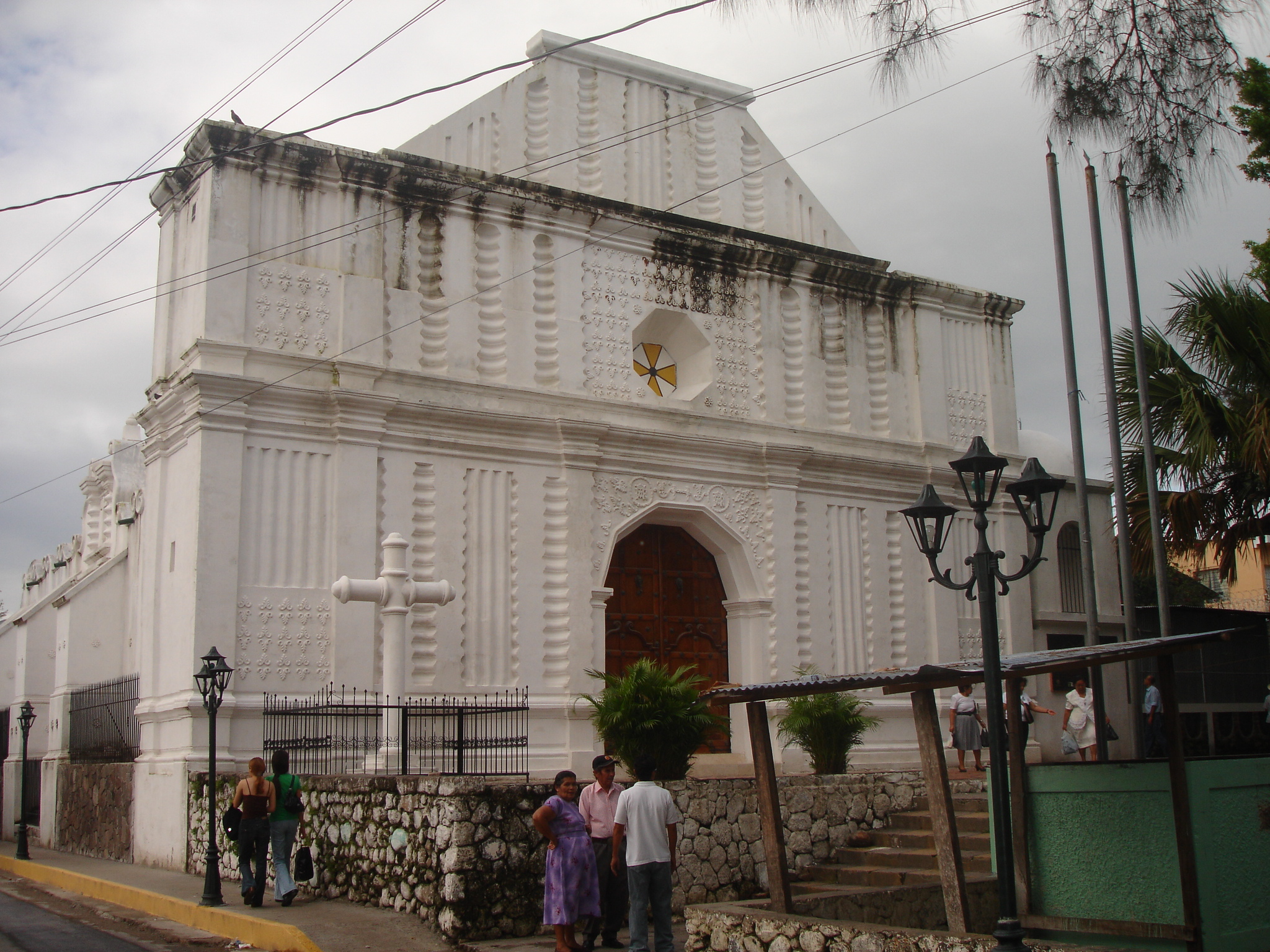 La Iglesia del Pilar, es una centenaria edificación que guarda su diseño original, pese a sufrir daños que la llevaron a permanecer cerrada por algún tiempo.